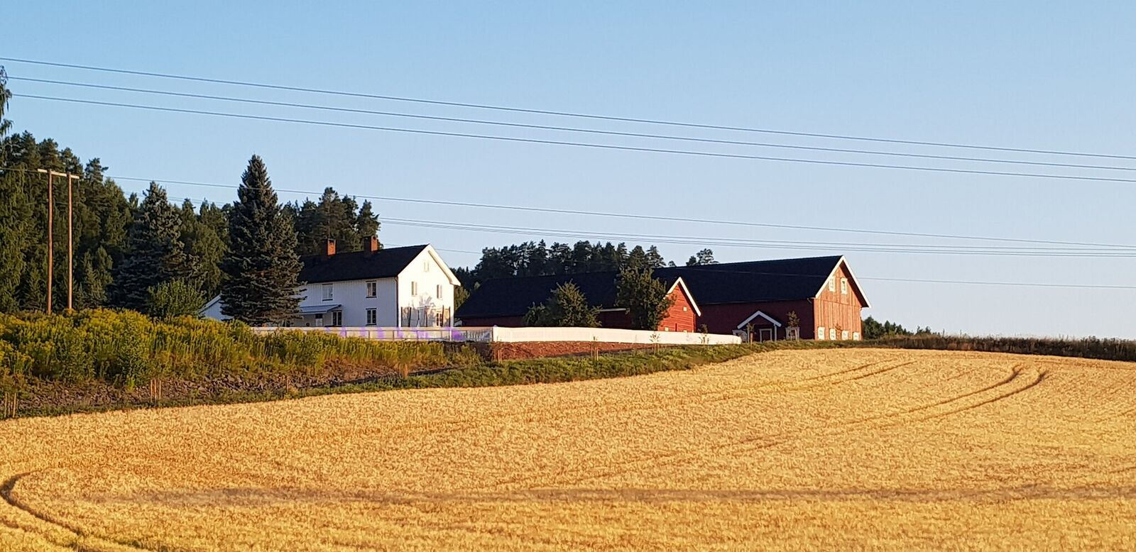 Sett sørøstfra.